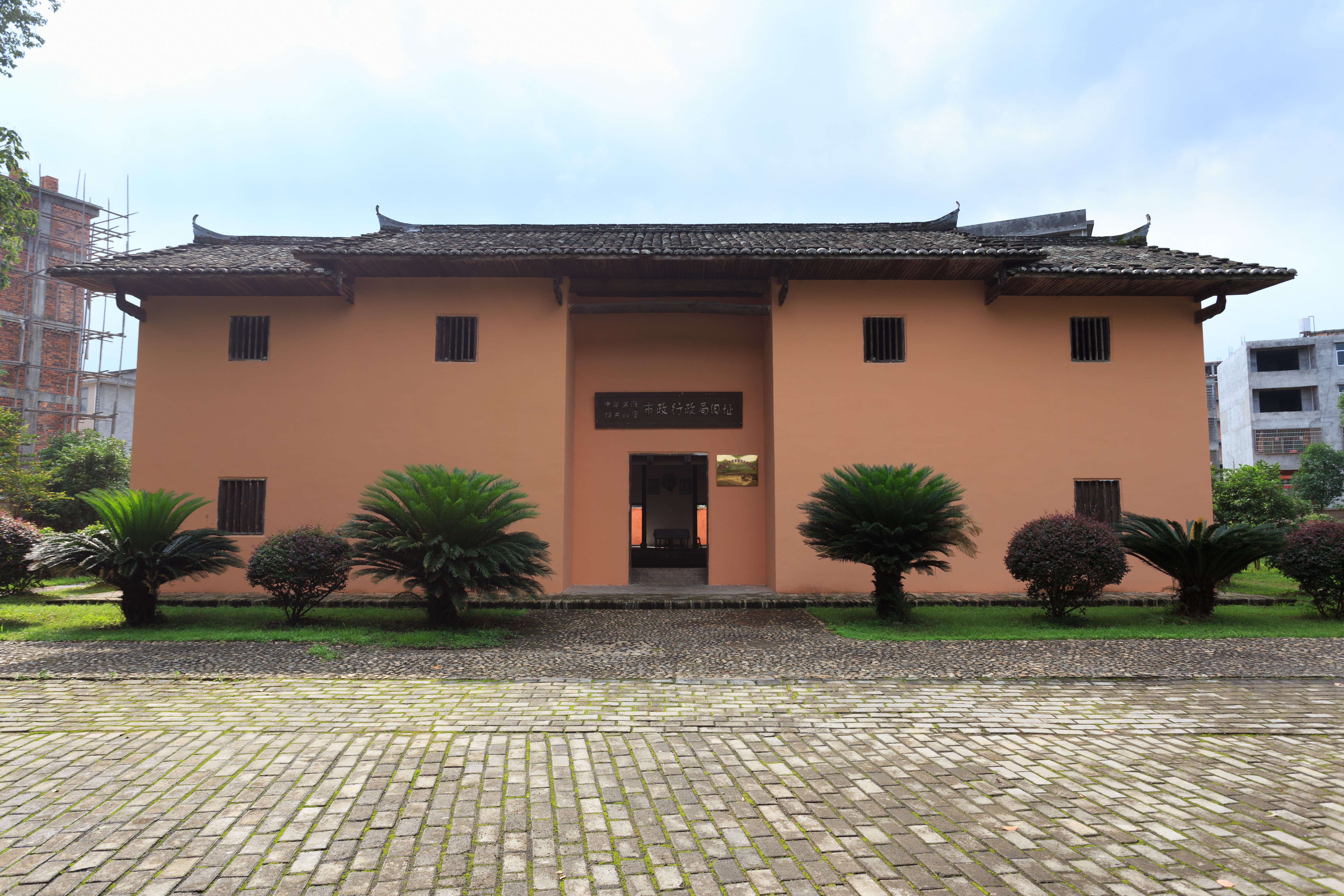 瑞金沙洲坝革命旧址—— 中华苏维埃共和国市政行政局旧址